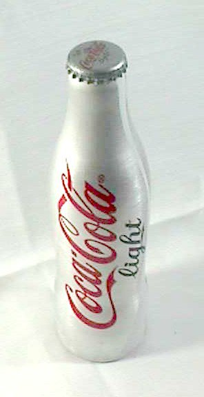 Lata de Coca Cola light